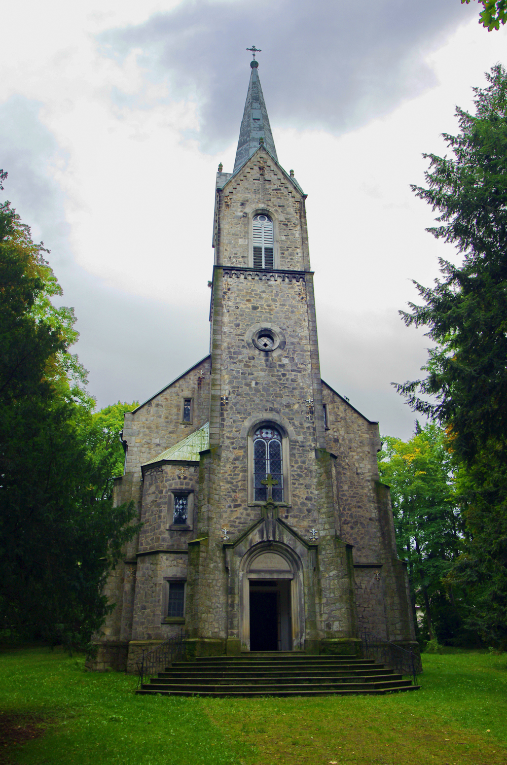 Jeseník, evangelický kostel